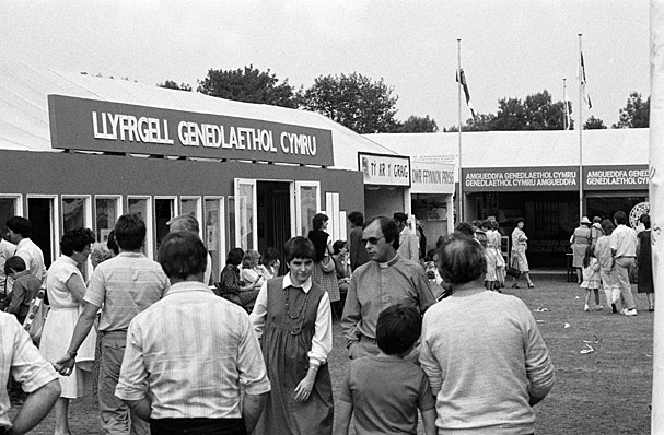 Teitl Cymraeg/Welsh title: Eisteddfod Genedlaethol Cymru 1984, Llanbedr Pont Steffan a'r Fro Ffotograffydd/Photographer: Geoff Charles (1909-2002) Dyddiad/Date: August 4, 1984. Cyfrwng/Medium: Negydd ffilm / Film negative Cyfeiriad/Reference: (gcc92559) Rhif cofnod / Record no.: 6154735 Rhagor o wybodaeth am gasgliad Geoff Charles yn Llyfrgell Genedlaethol Cymru More information about the Geoff Charles Collection at the National Library of Wales Mae ffotograffau Geoff Charles hefyd yn rhan o Broject Europeana Libraries Geoff Charles' photographs also form part of the Europeana Libraries Project